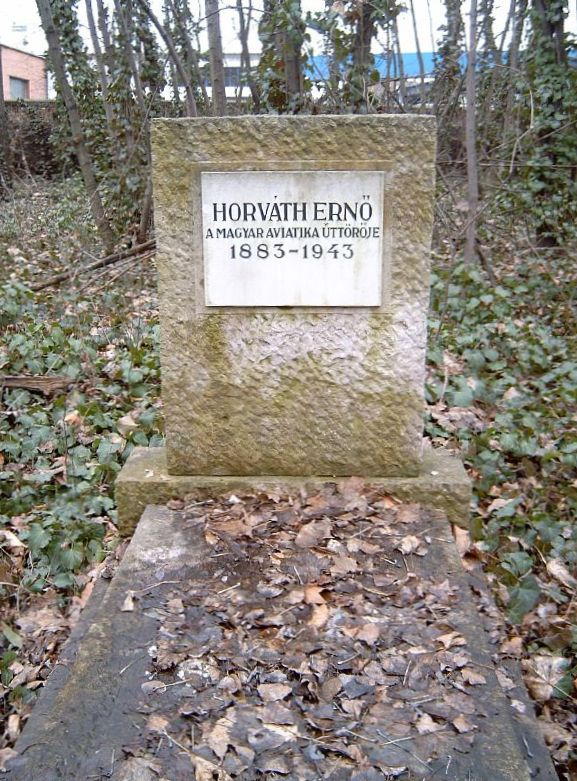 Horváth Ernő (Budapest, 1883. november 11. – Budapest, 1943. január 3.) tanár, a hazai aviatika úttörőjének sírja Budapesten. Kerepesi temető: 49-2-57.